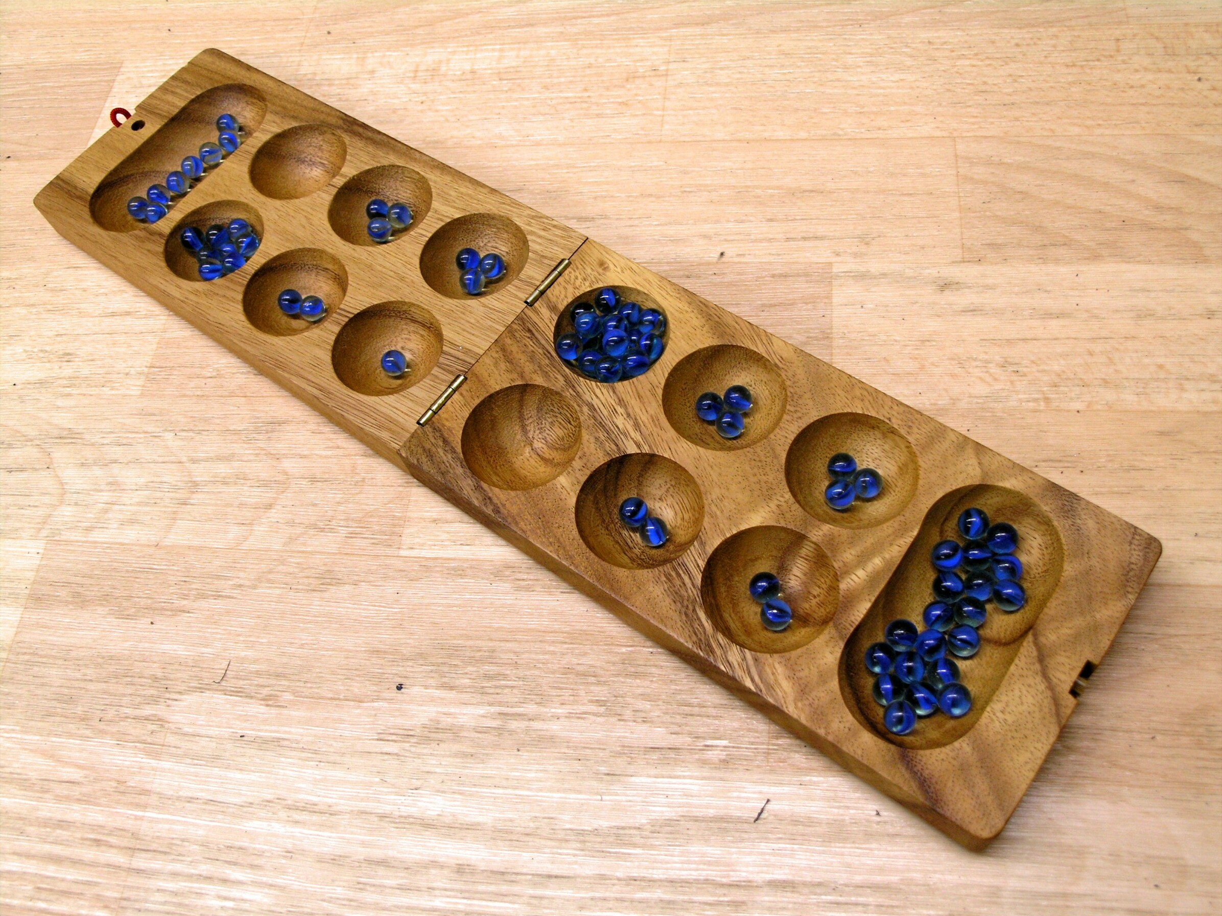 Kalaha